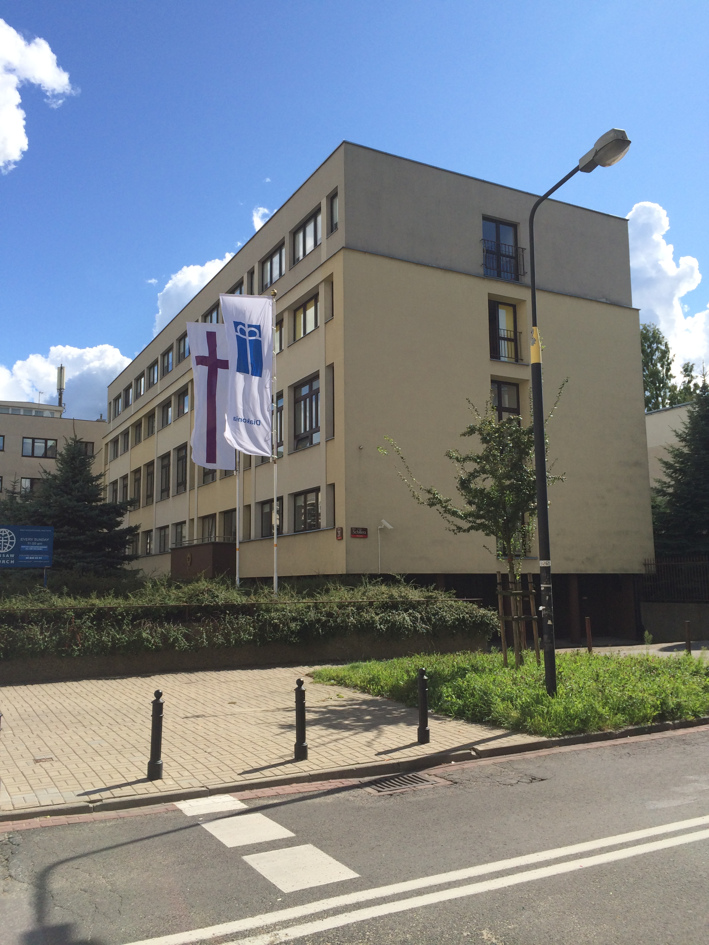 Budynek przy ul. Miodowej 21 w Warszawie mieszczący m.in. dziekanat Wydziału Teologicznego ChAT